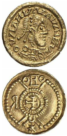 קראַנטקייַט סוואַביאַן מלך פון גאַליציע, רעקוויאַריאָ (411-500) מינץ: בראַגאַ נומיסמאַטיק קאַלעקשאַן, נאַציאָנאַלער מוסעומס אין בערלין